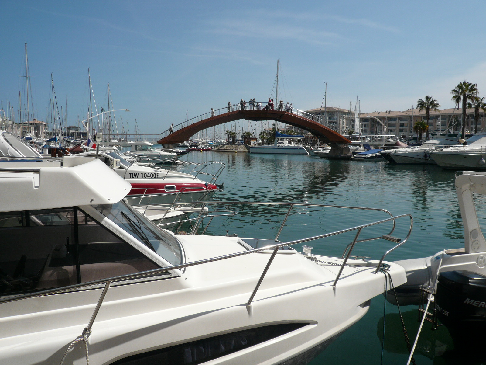 Pont du port de Fréjus